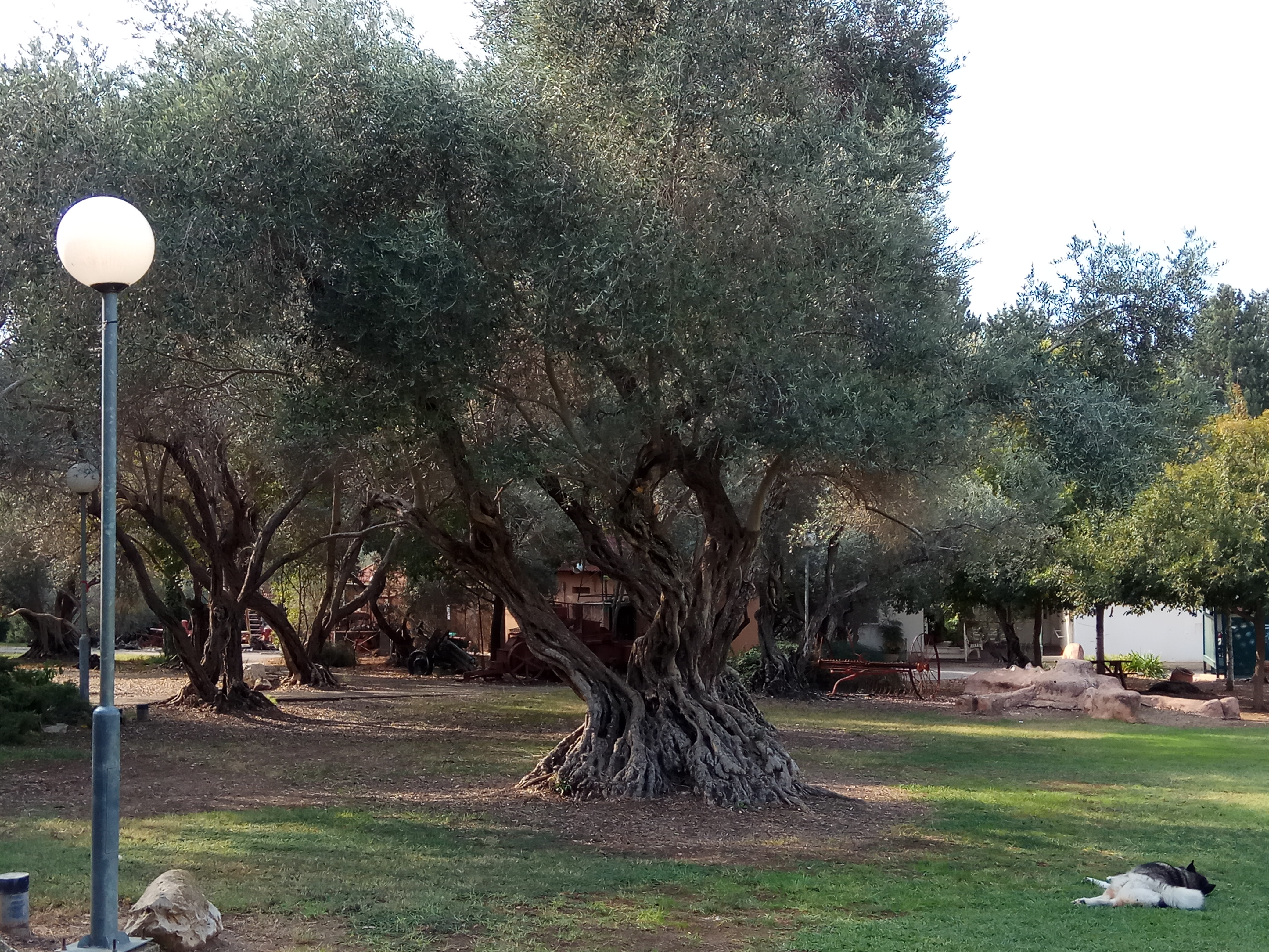 עץ זית בקיבוץ מגל